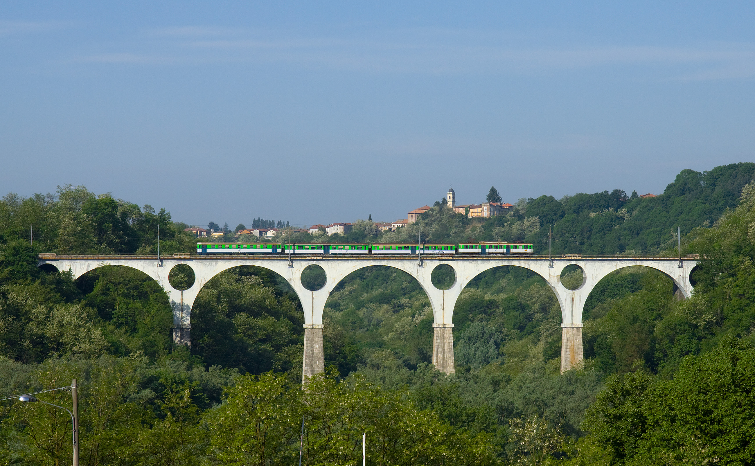 Viadotto ferroviario di Malnate, sulla linea Como–Varese–Laveno delle FNM.